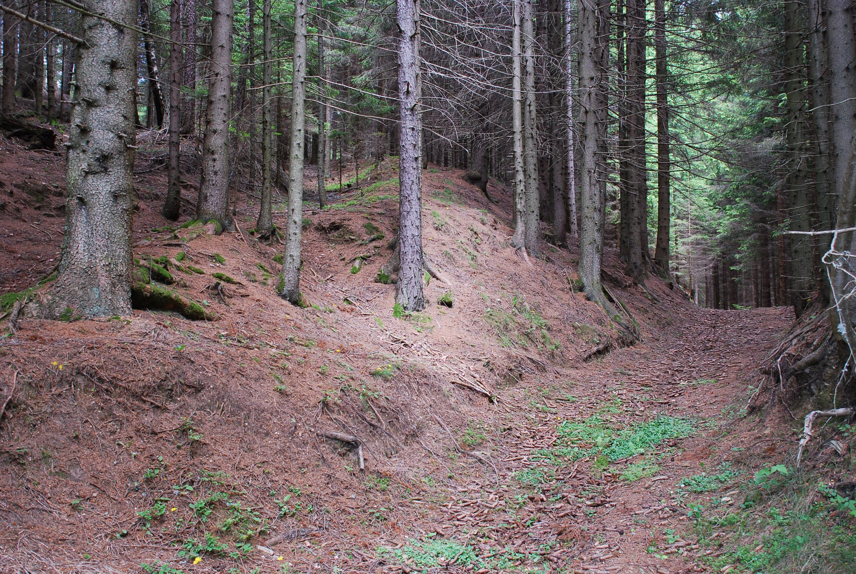 Verzweigung zweier Wege auf die Hebalm. Linker Fußsteig seit ca. 1970 außer Gebrauch